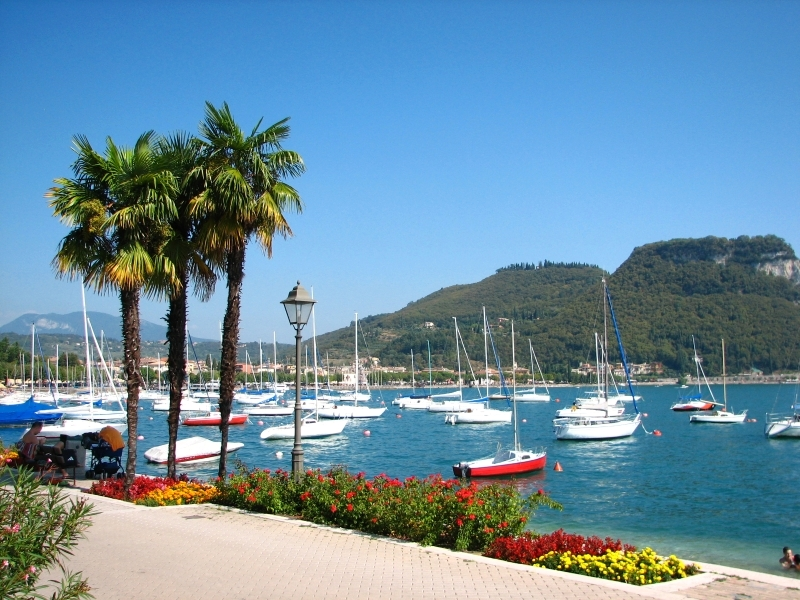 Garda - Lago di Garda